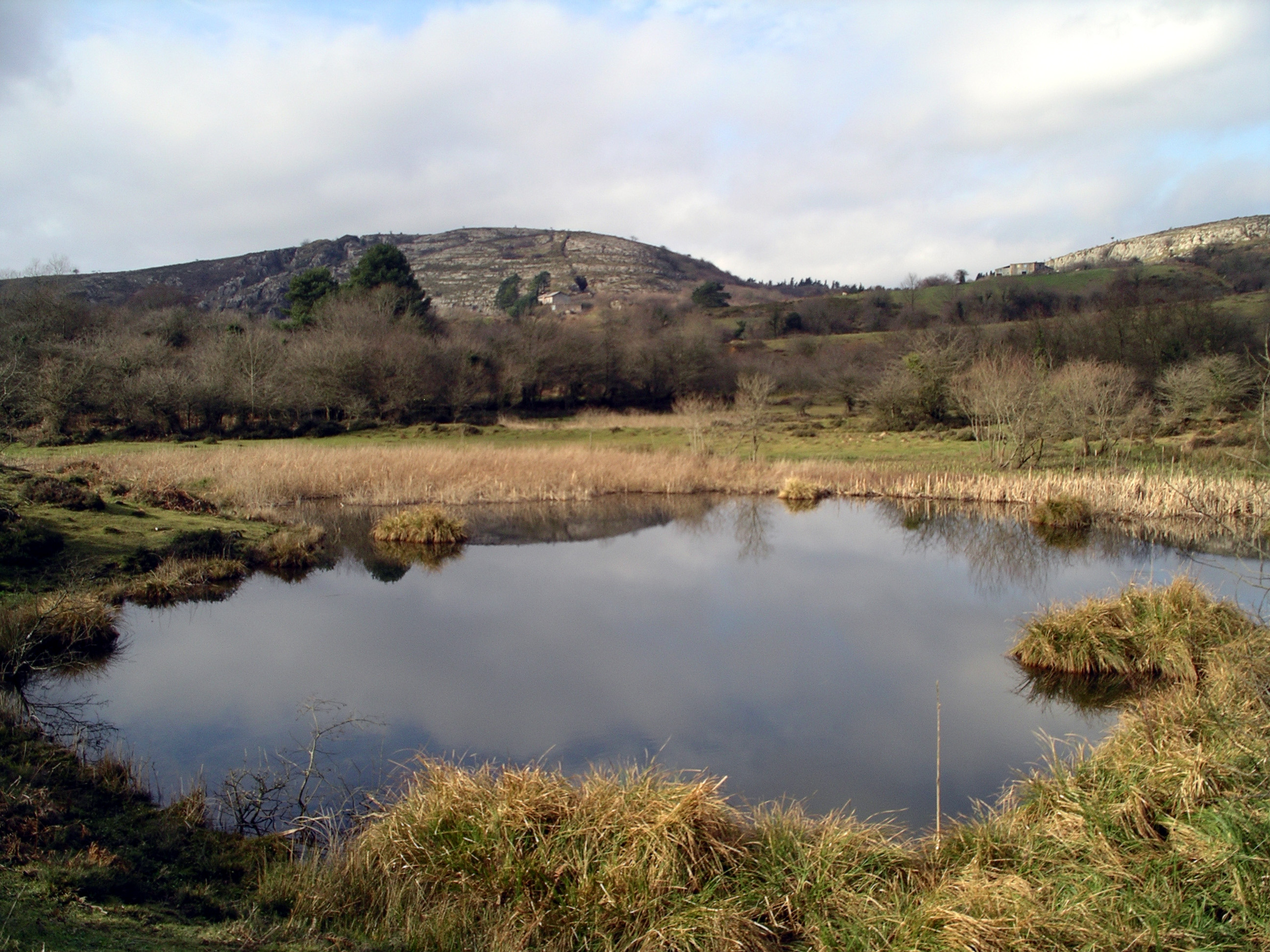 Eskatxabeleko osina, Galdames, Bizkaia.